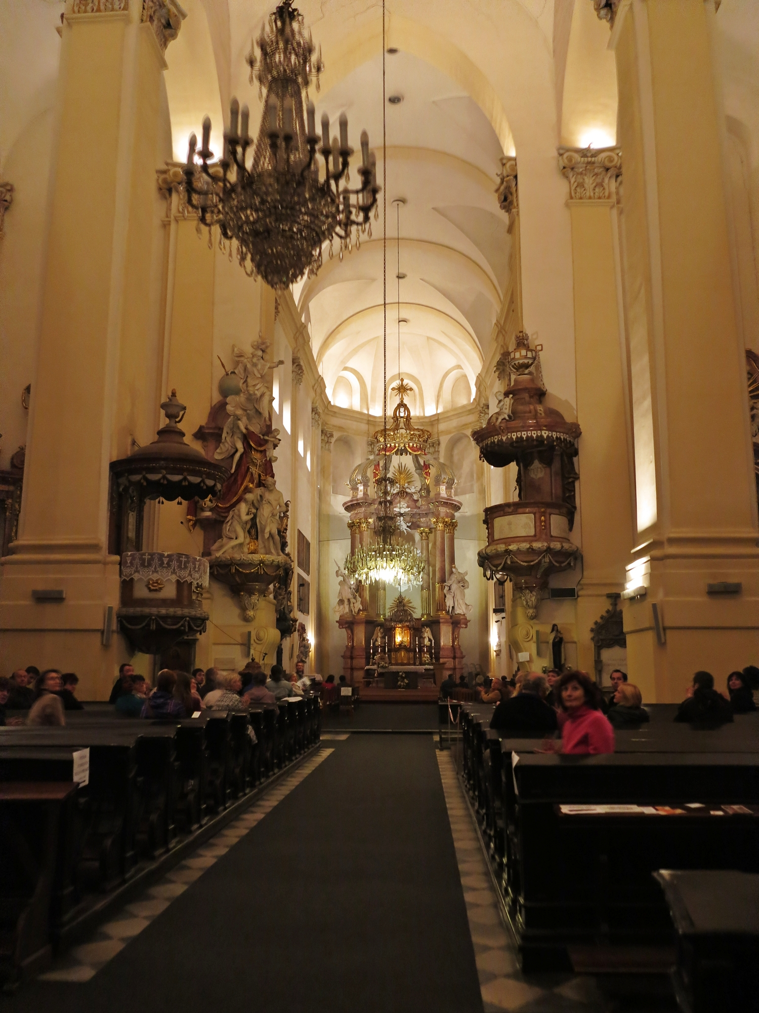 Konkatedrála Nanebevzetí Panny Marie, Rybí trh, Opava-Město, Opava.